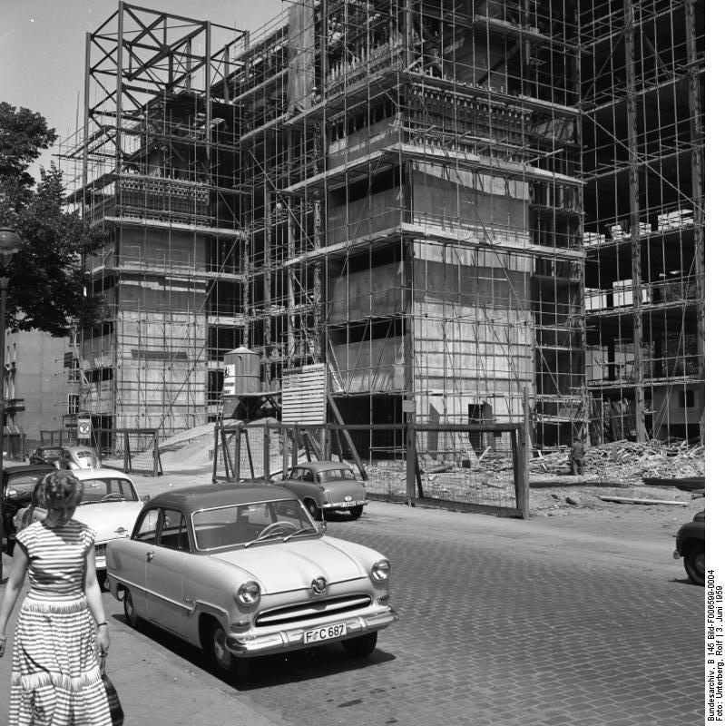 Stadtbilder Frankfurt/Main Johann Wolfgang von Goethe Universität Neubau der philosophischen Fakultät